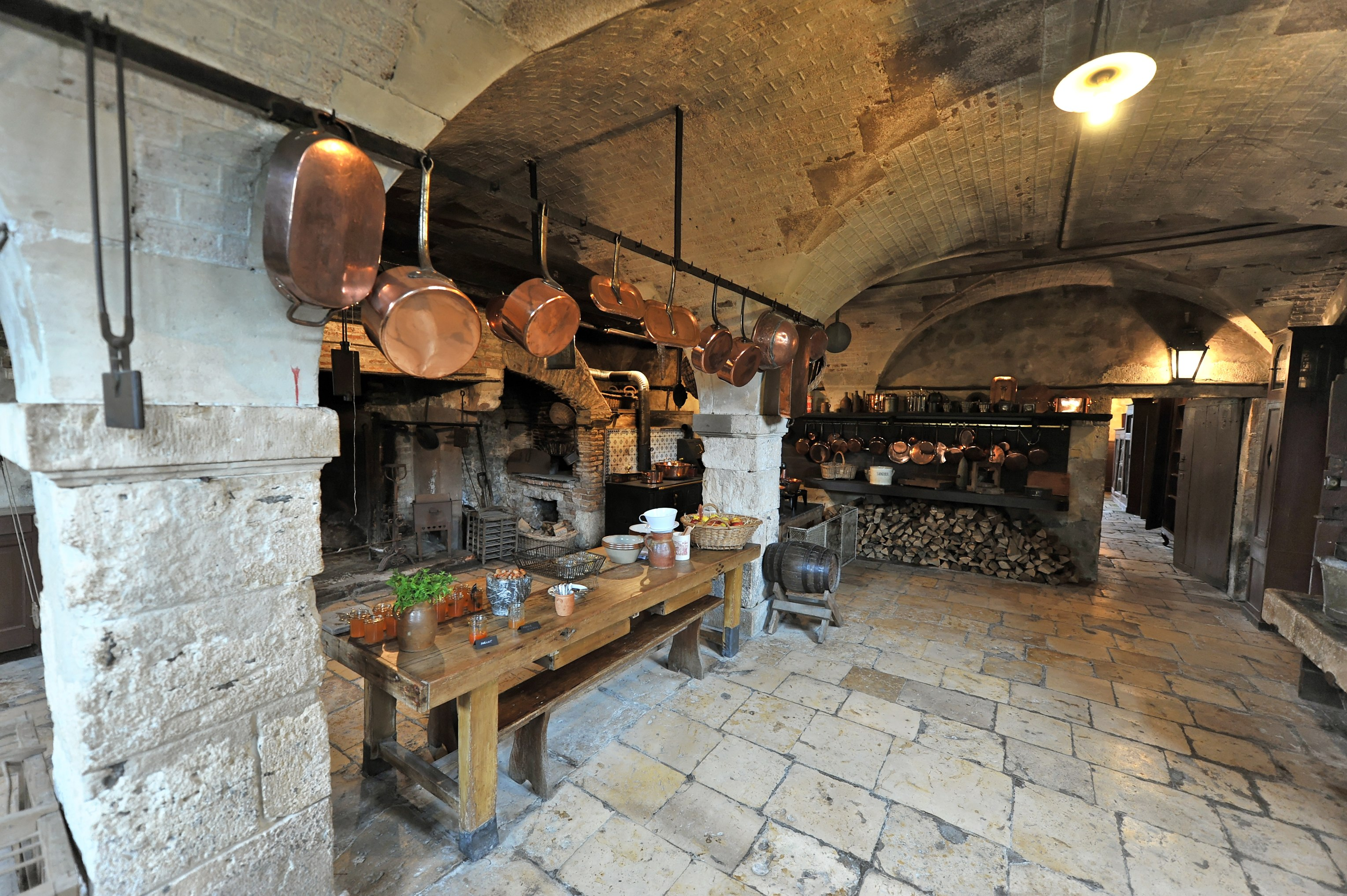 Küche des Schlosses La Ferté-Saint-Aubin